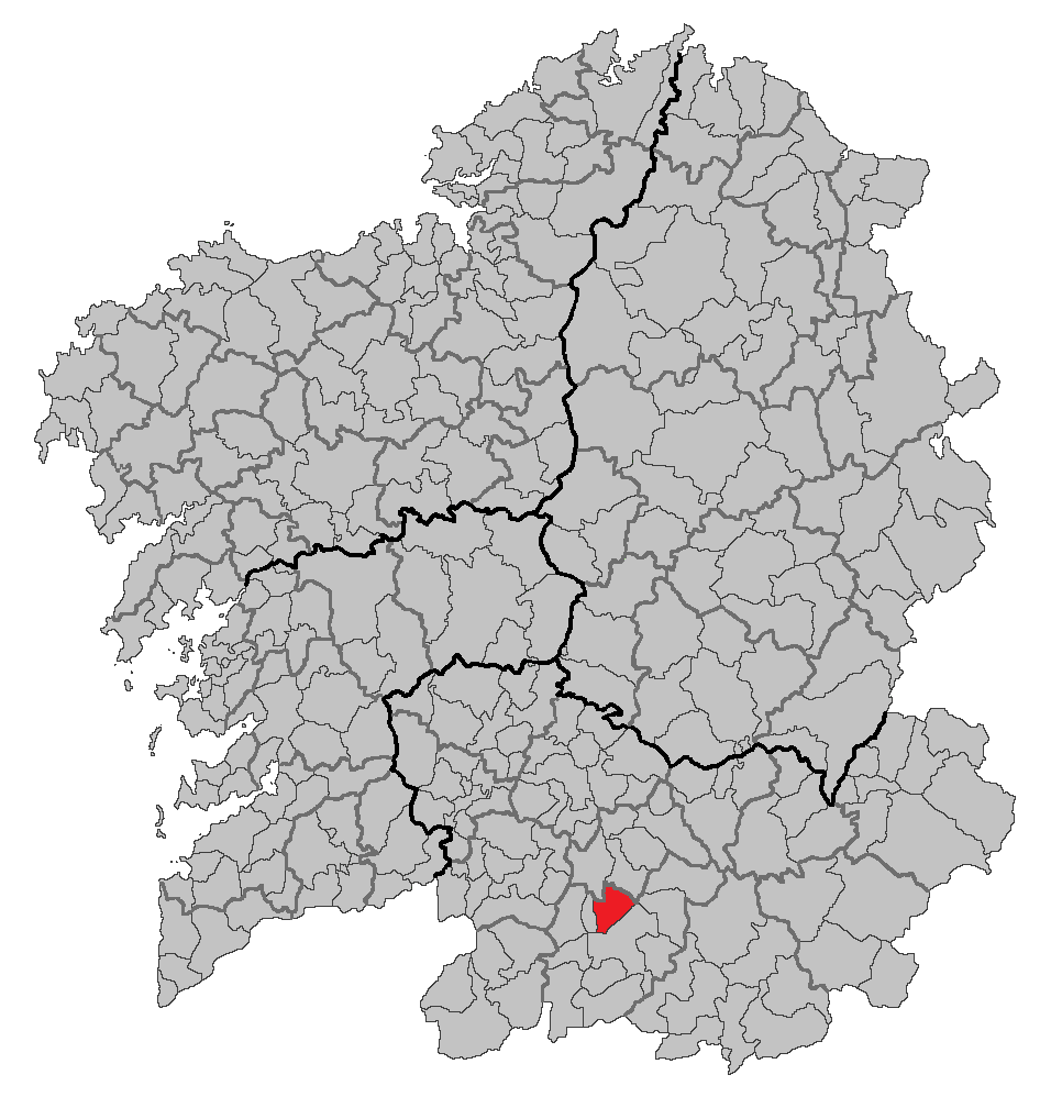 Mapa coa localización do concello de Sandiás.